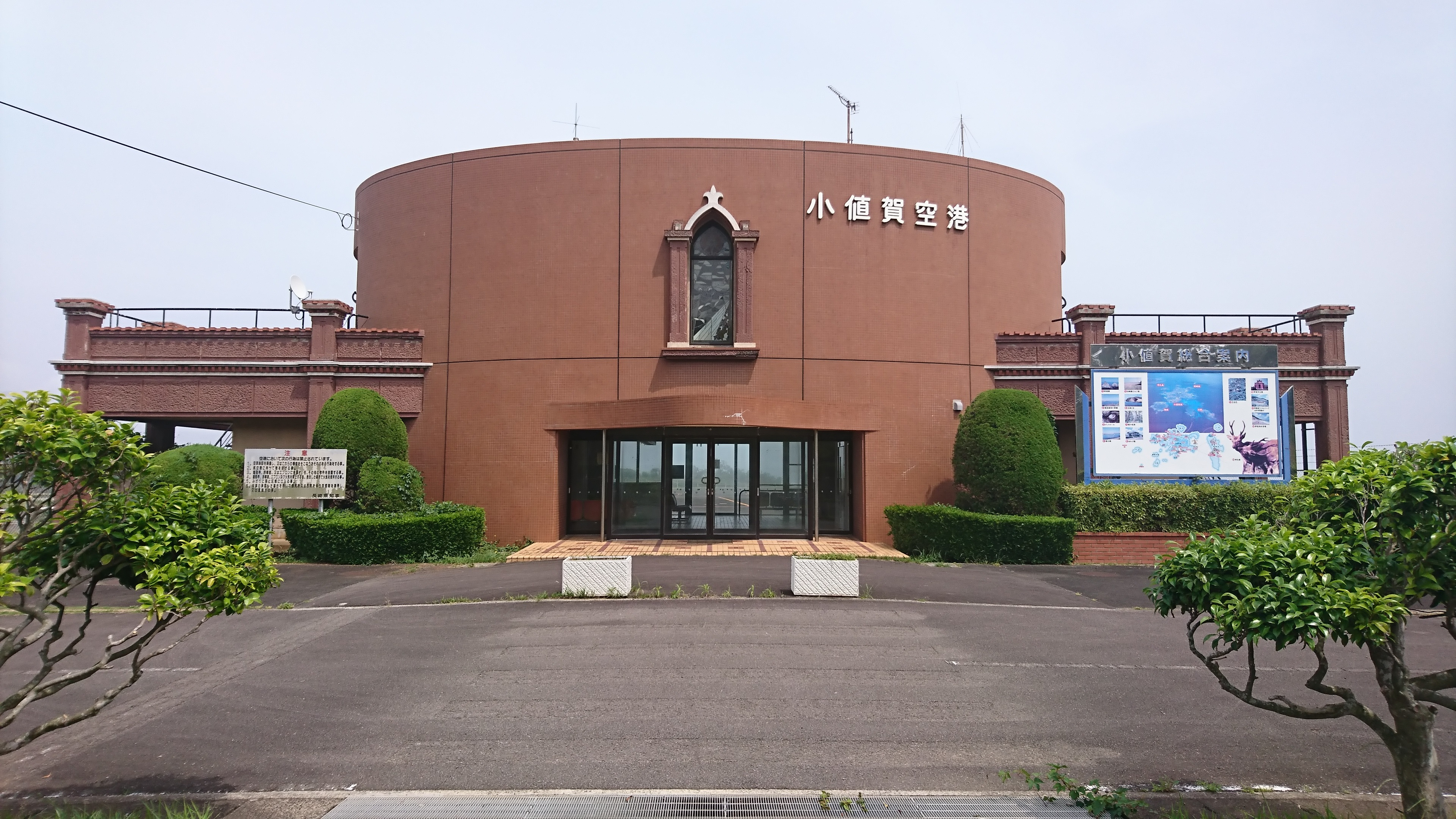 小値賀空港ターミナル外観